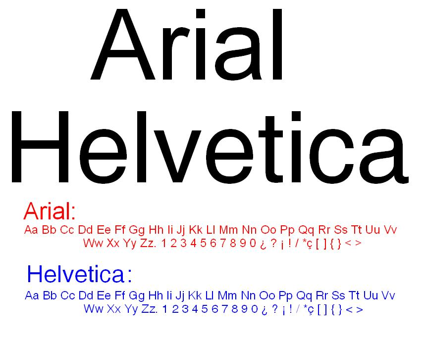 Un esquema de Helvetica y arial